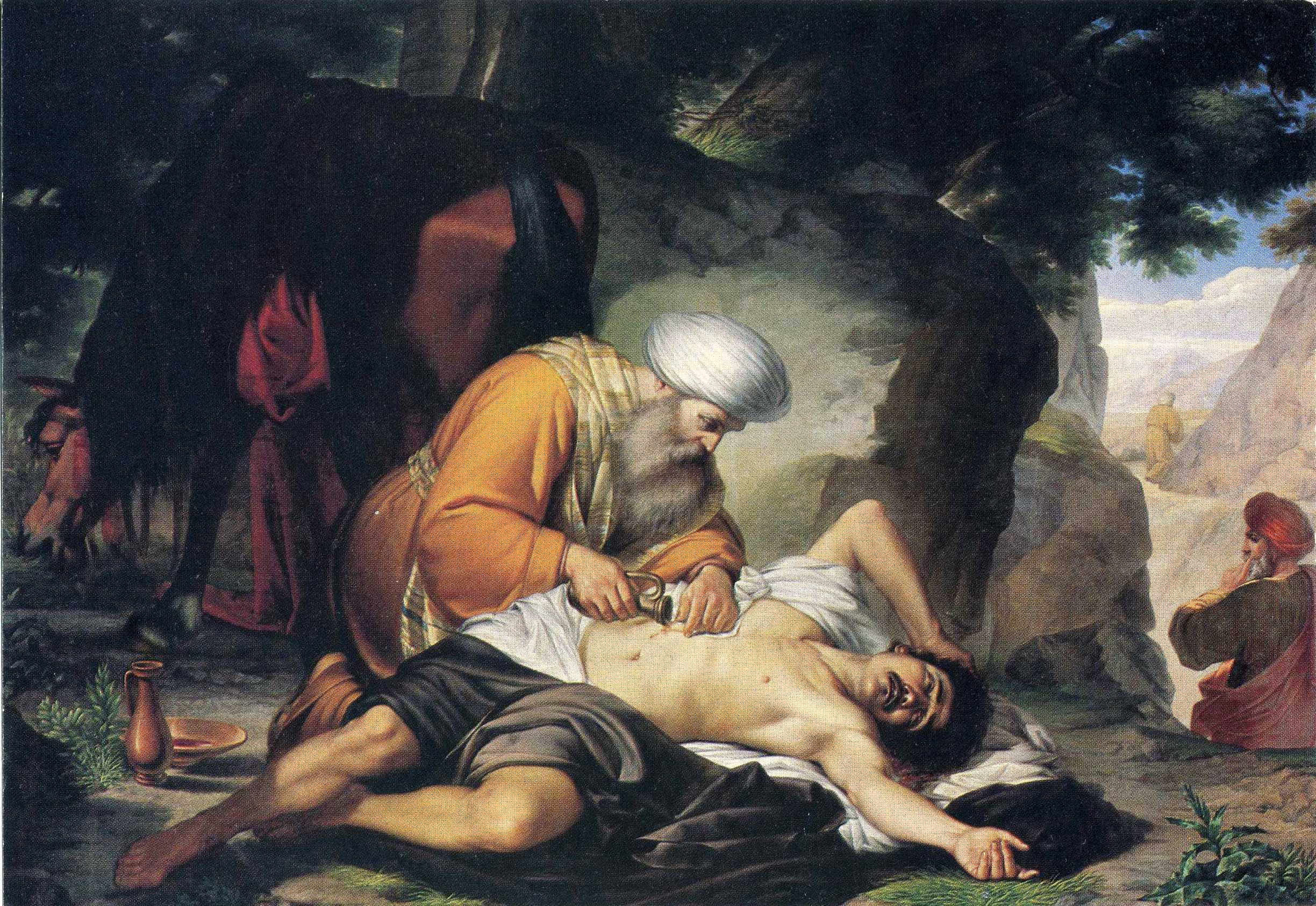 La parabola del Buon Samaritano Messina Chiesa della Medaglia Miracolosa Casa di Ospitalità Collereale